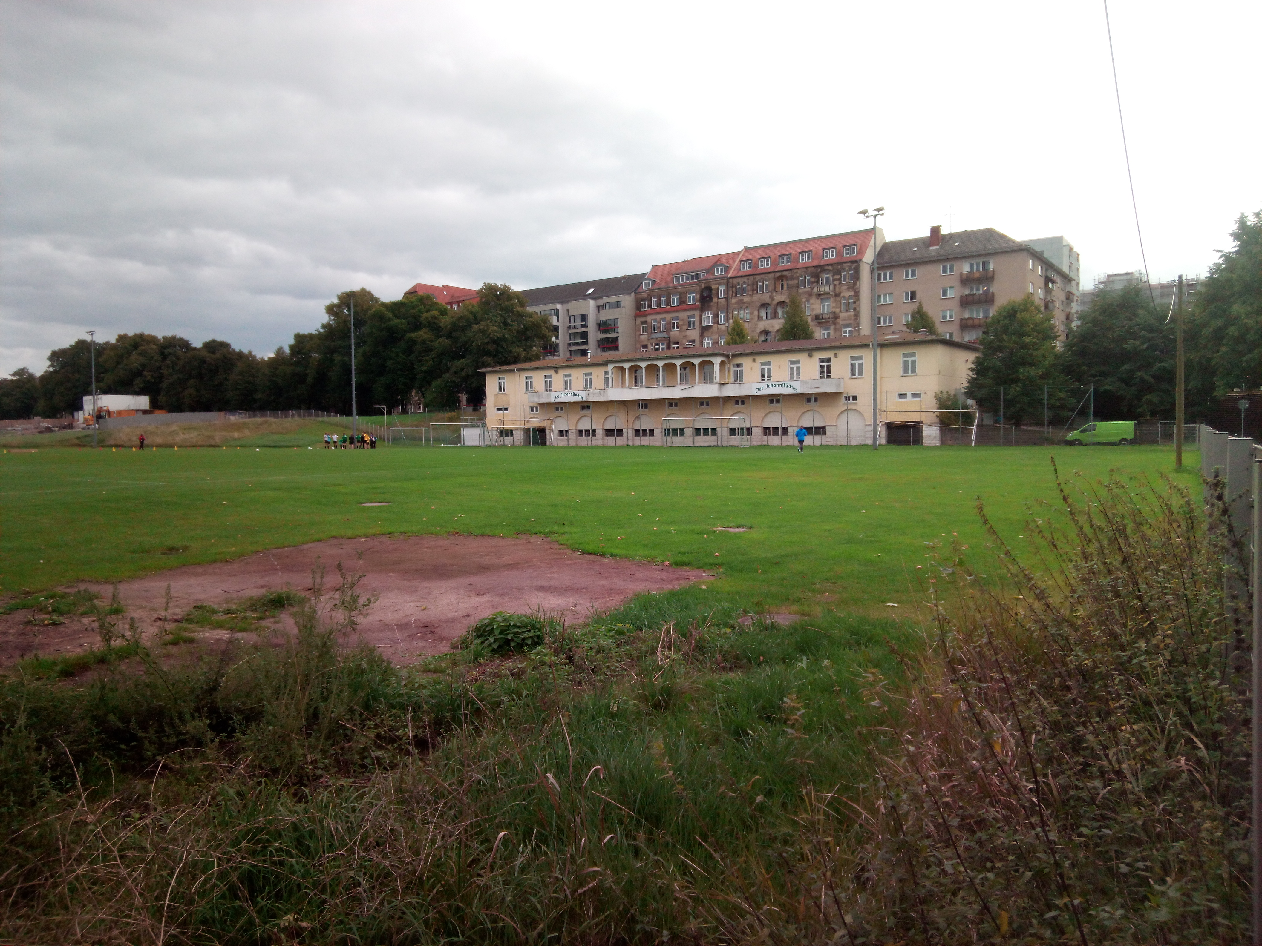 Abfertigungsgebäude für den ehemaligen Wasserflugplatz Dresden-Johanstadt